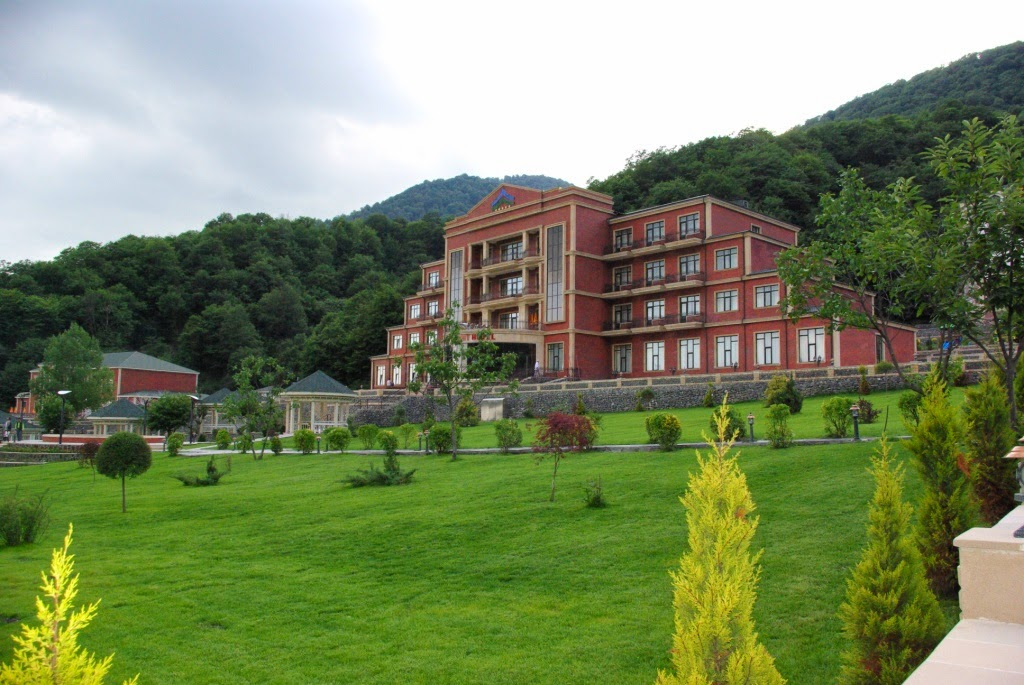 Qafqaz Resort Hotel